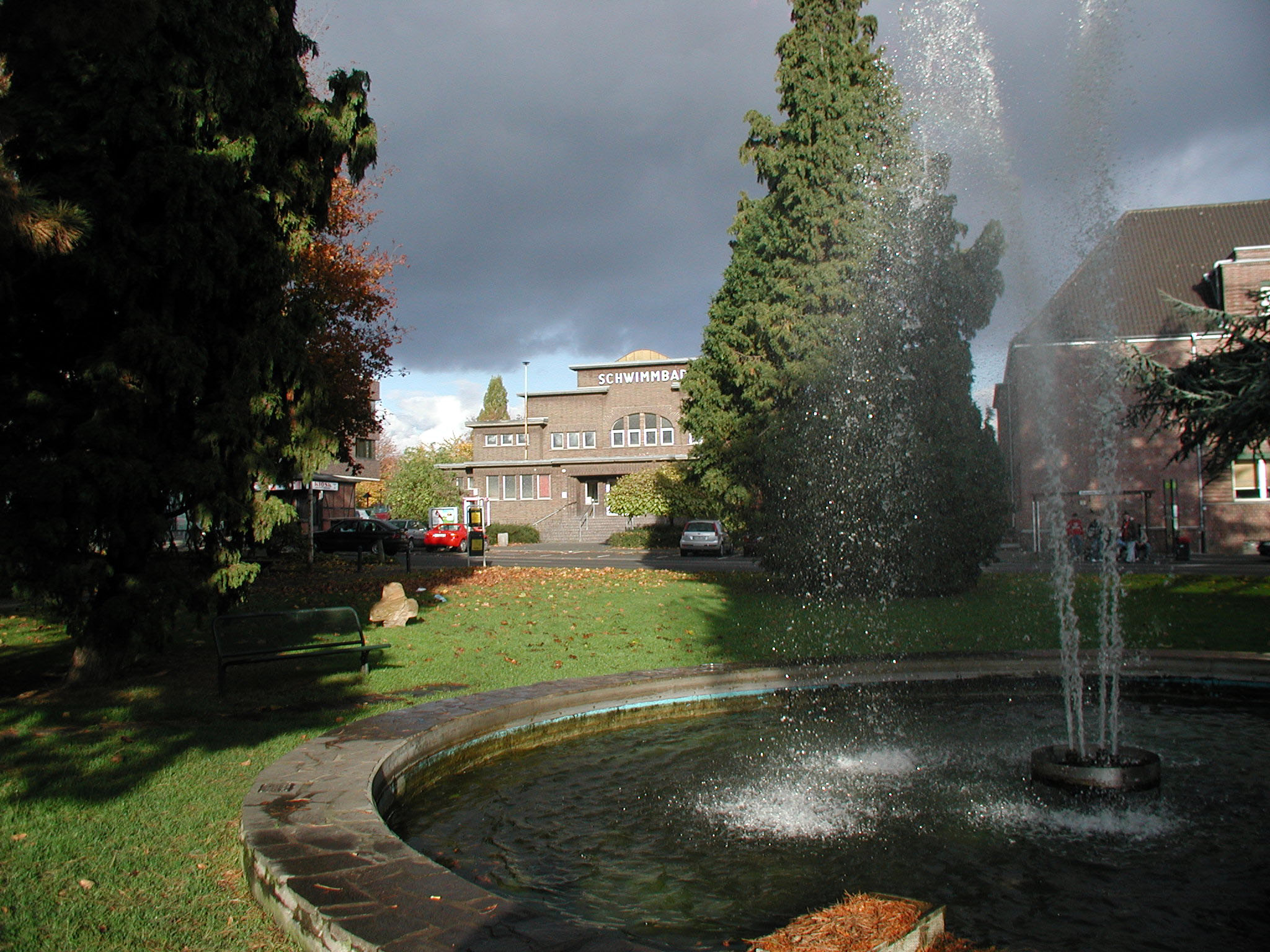 Hürth-Alt-Hürth, Altes Schwimmbad